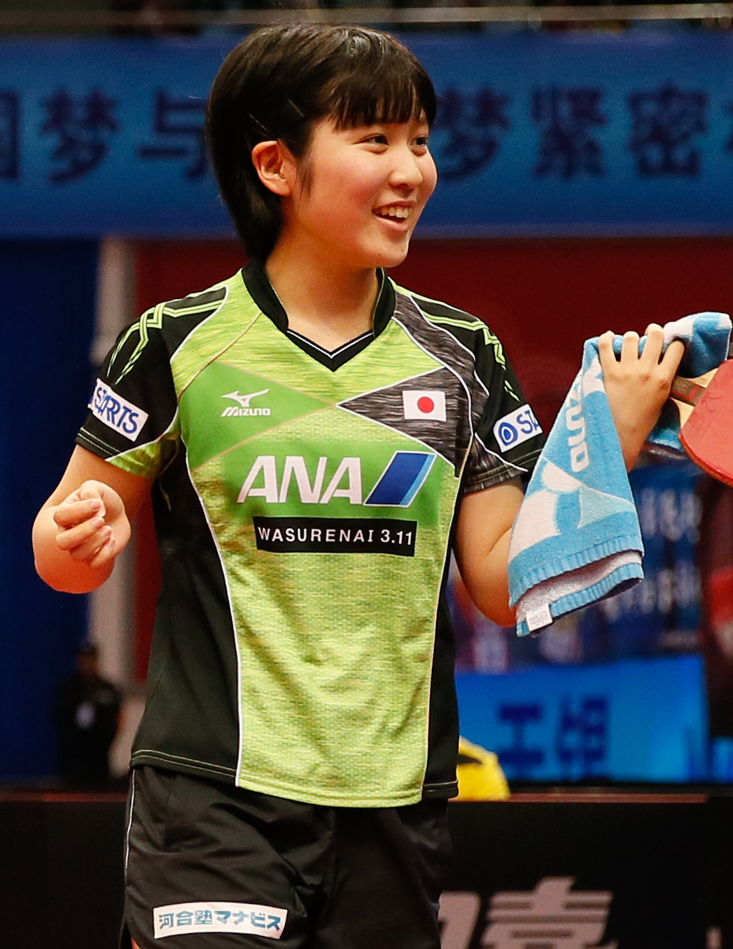 _K0K0637